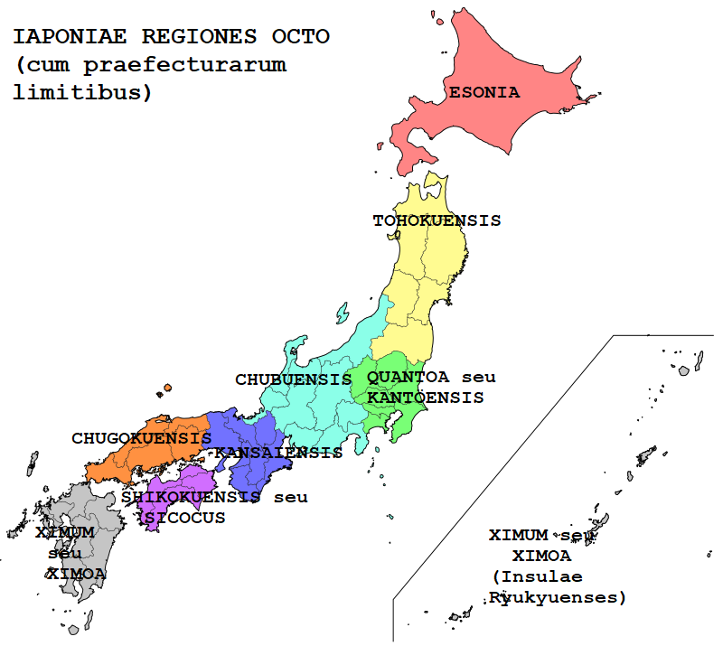 Tabula octo traditionales Iaponiae regiones Latine monstrat